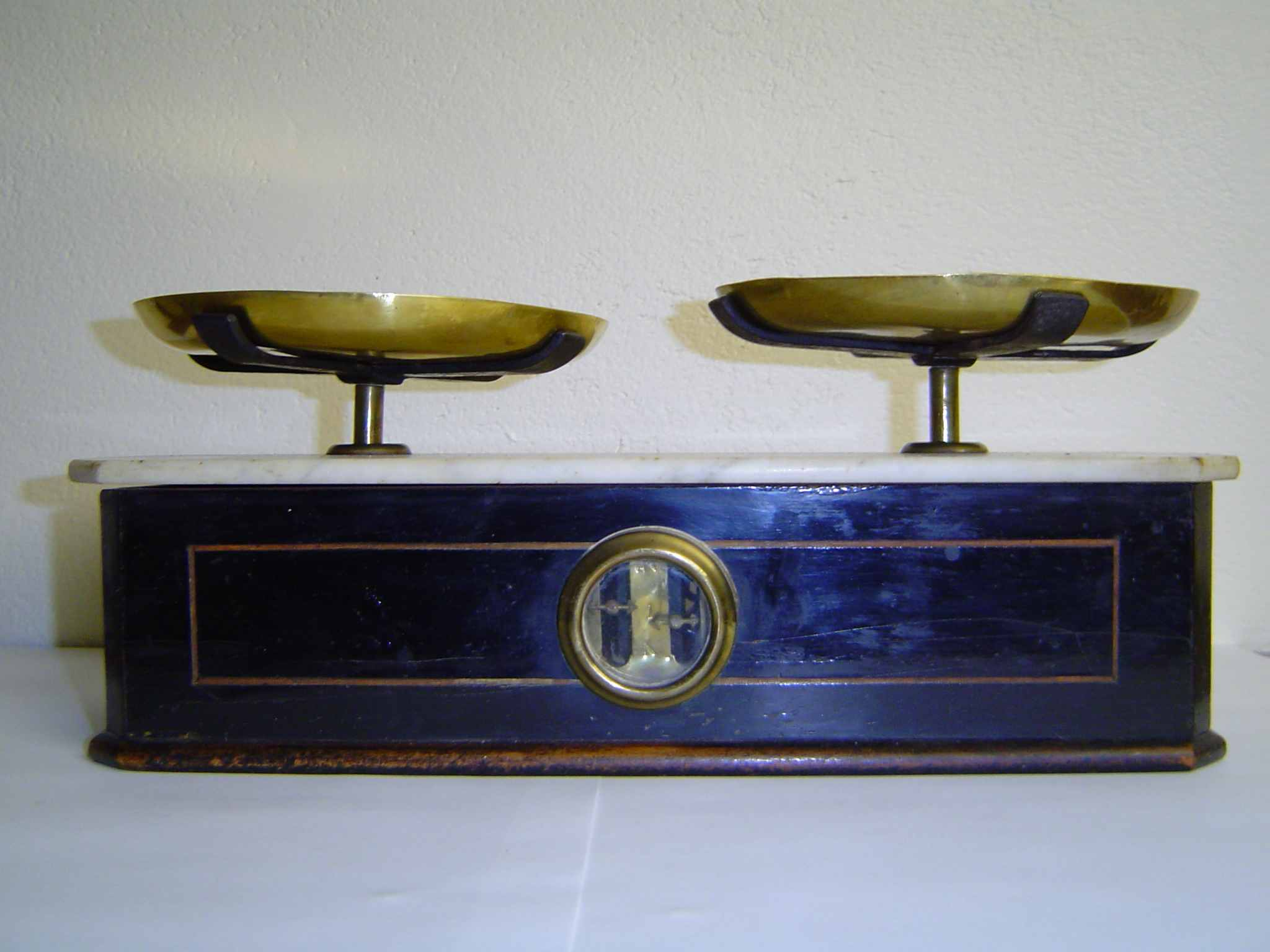 Photo personnelle de ma collection